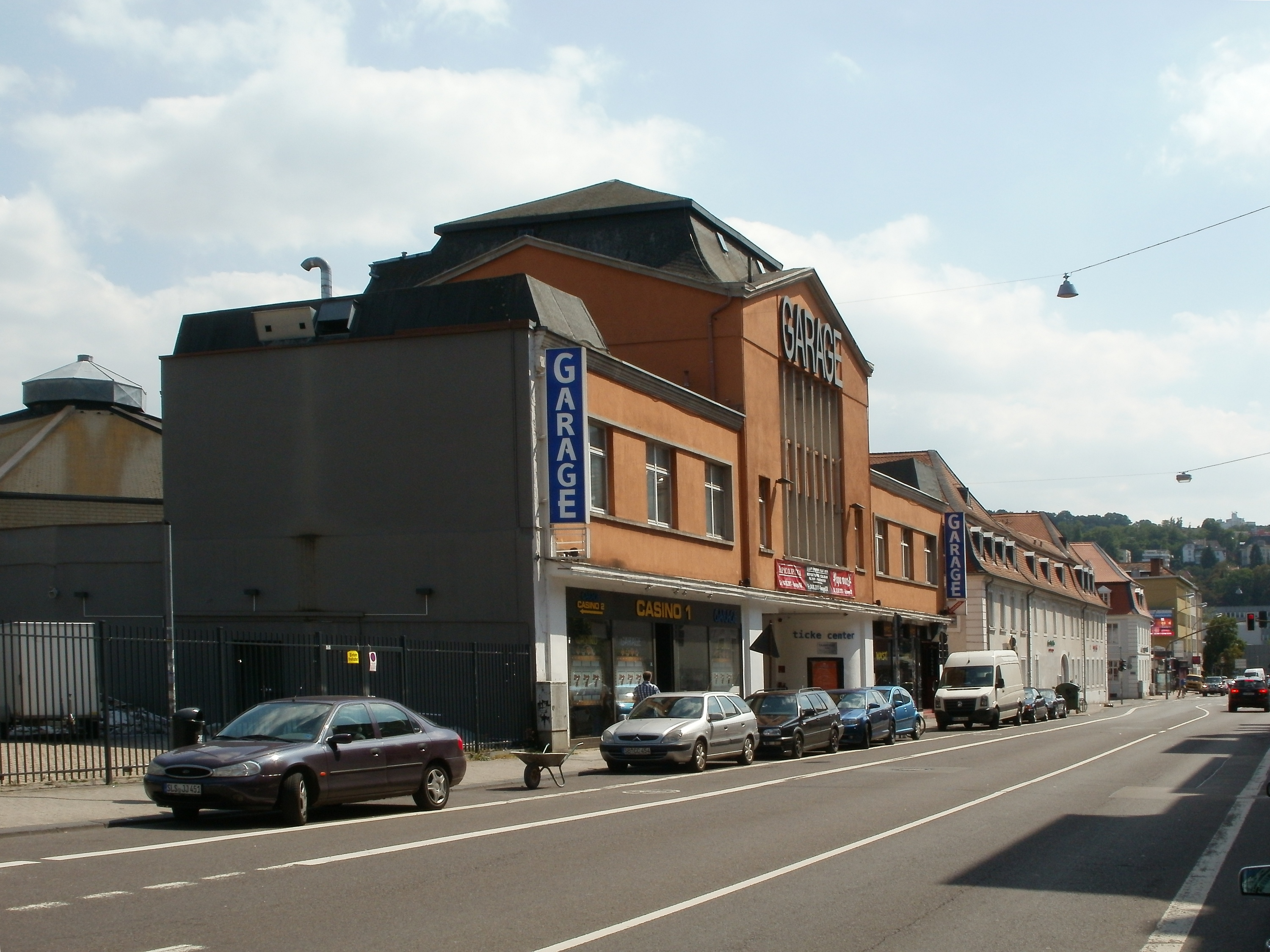 Veranstaltungszentrum „Garage“ in Saarbrücken, Bleichstraße 11; erbaut 1924 als Großgarage, ab 1989 umgenutzt